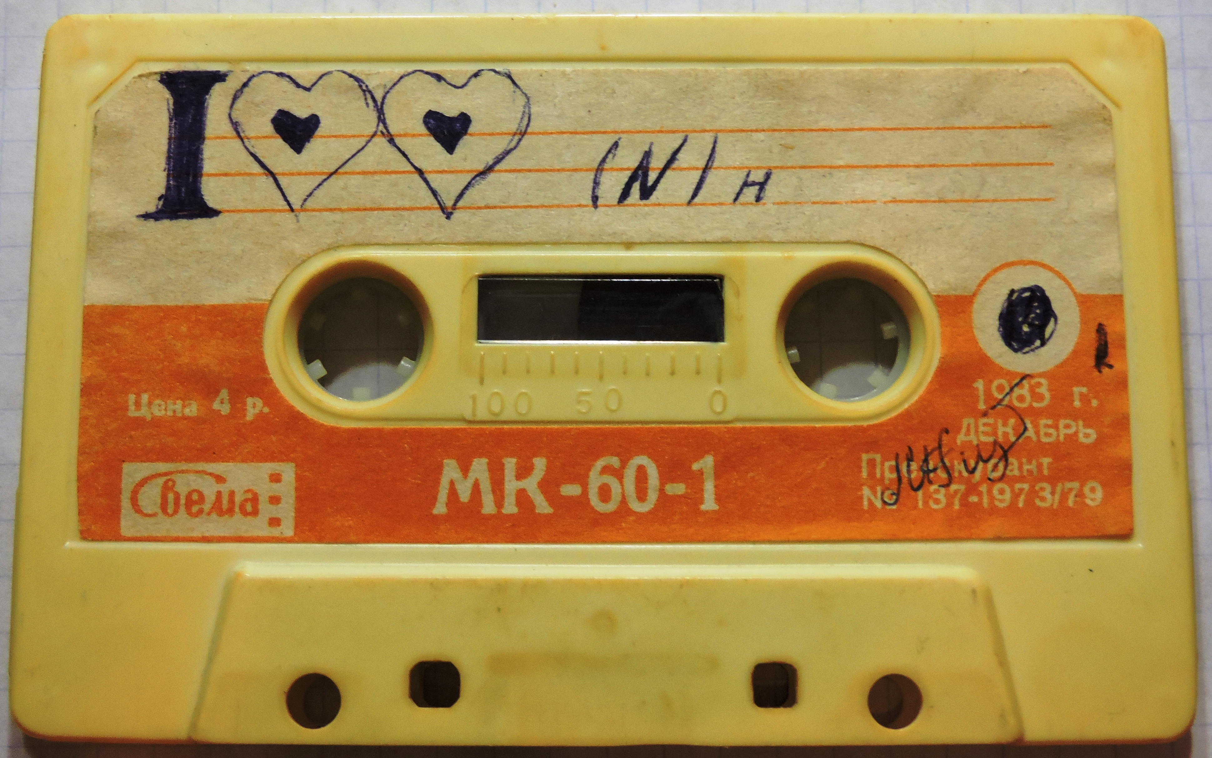 Советская аудиокассета "Свема"